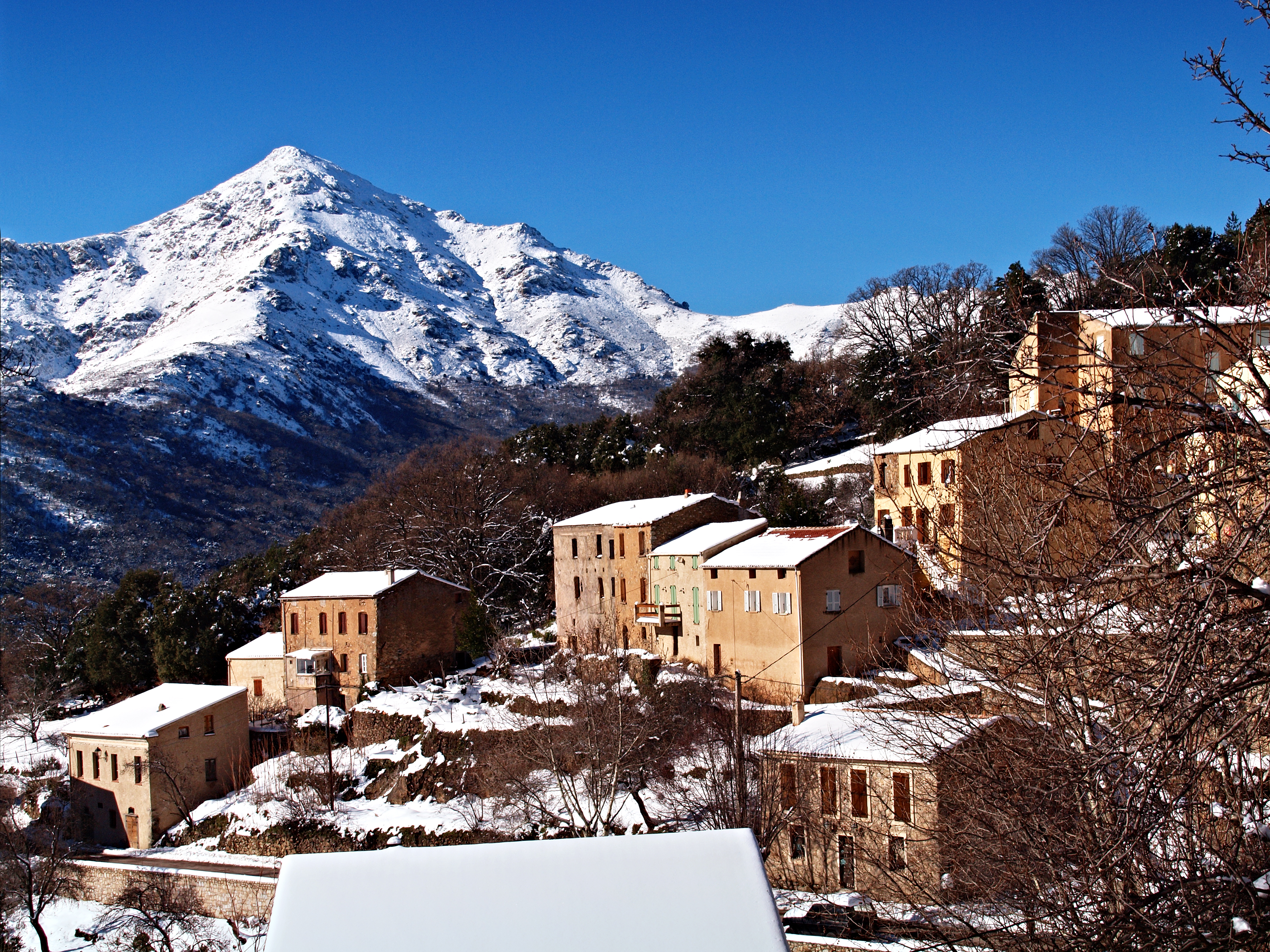 Olmi-Cappella (Corse) - Hameau d'Acquillacce et le San Parteo